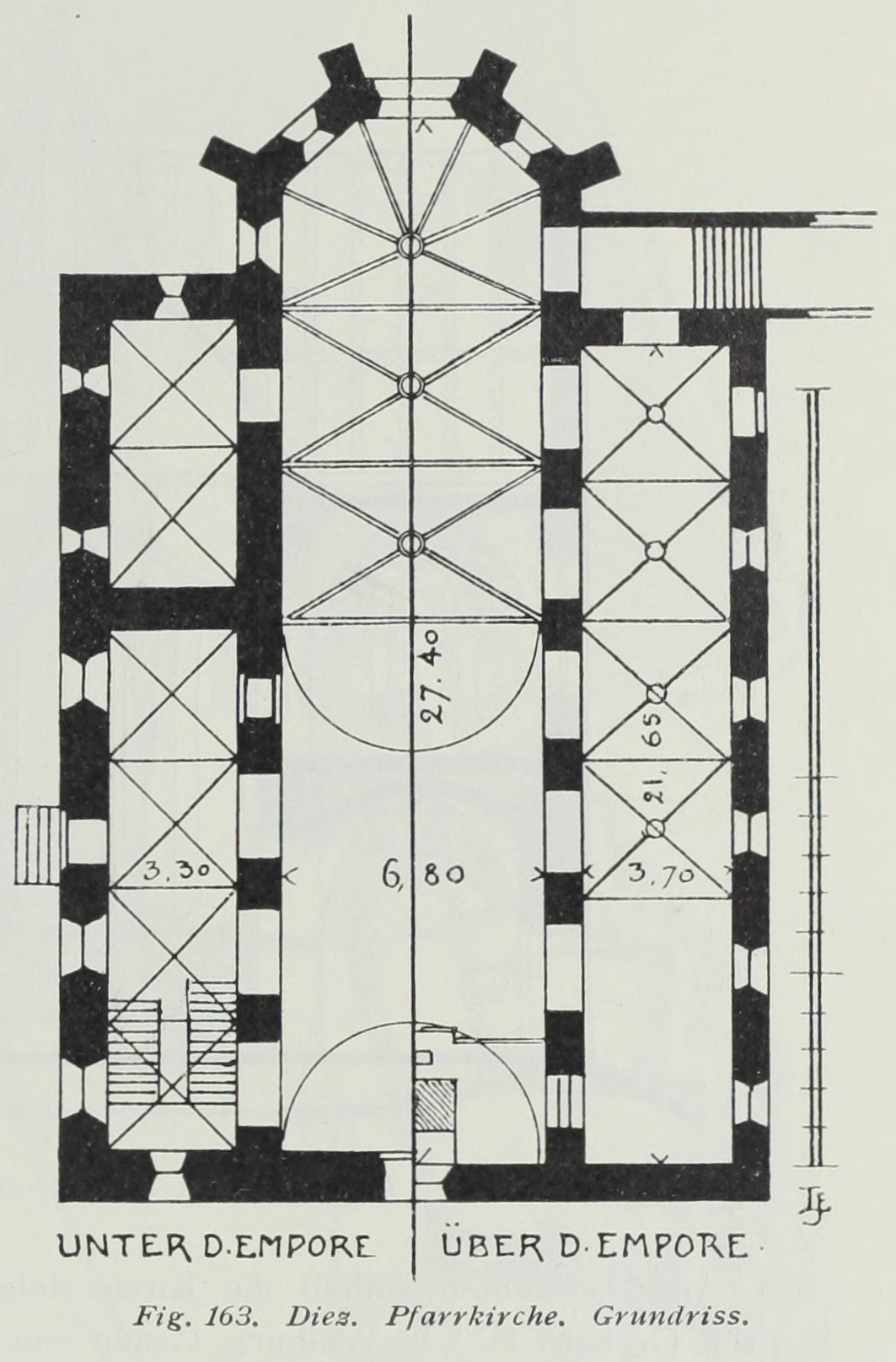 Diez Pfarrkirche Grundriss